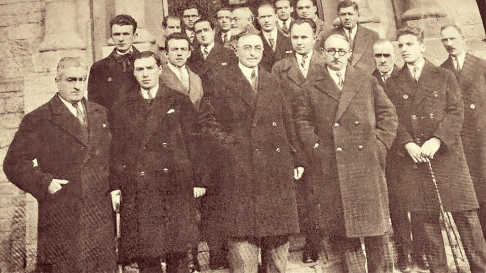 Rreth drejtorit teknik te Liceut